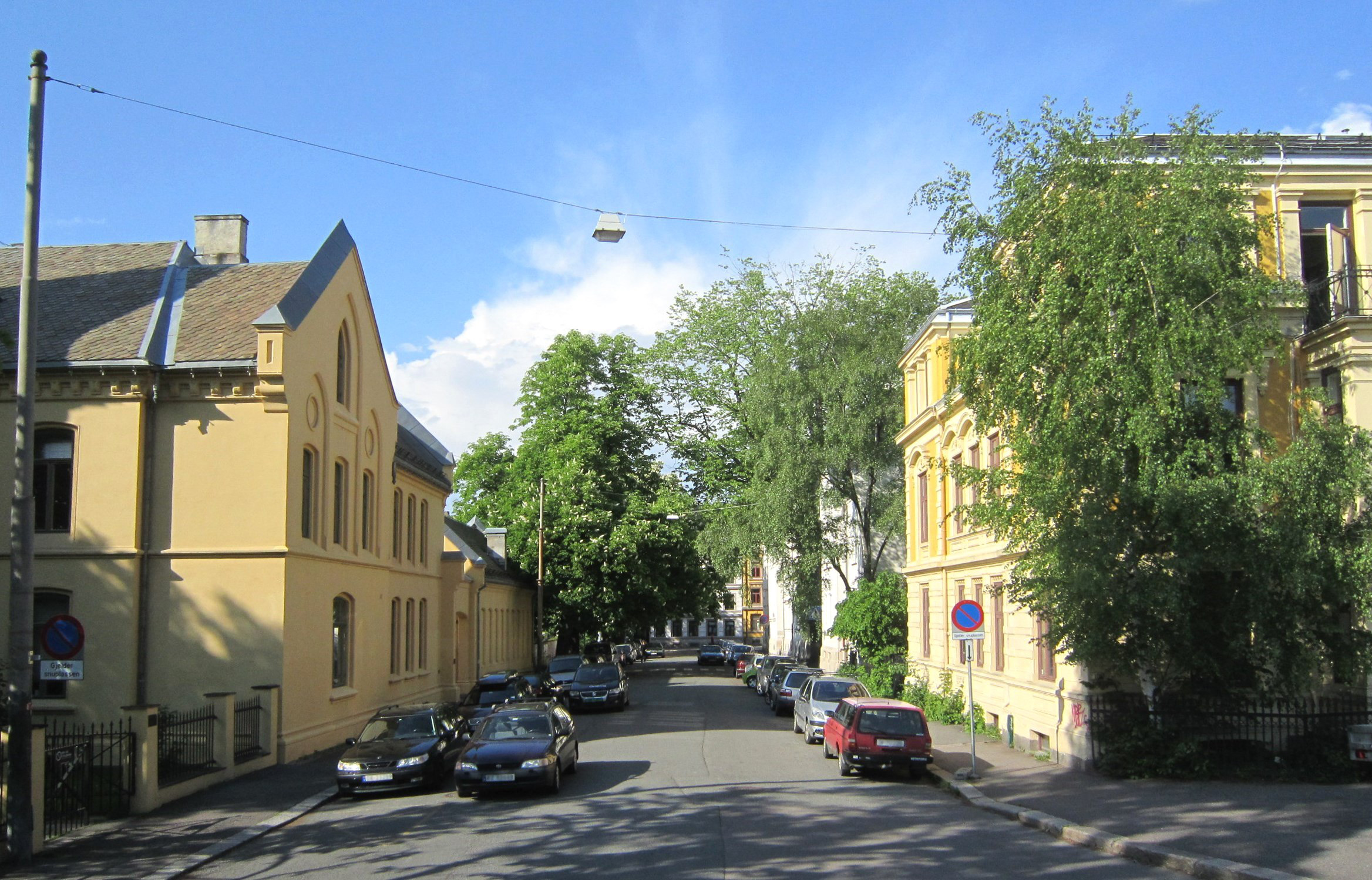 Egedes gate i Gamlebyen i Oslo nær sørenden mot St. Halvards gate